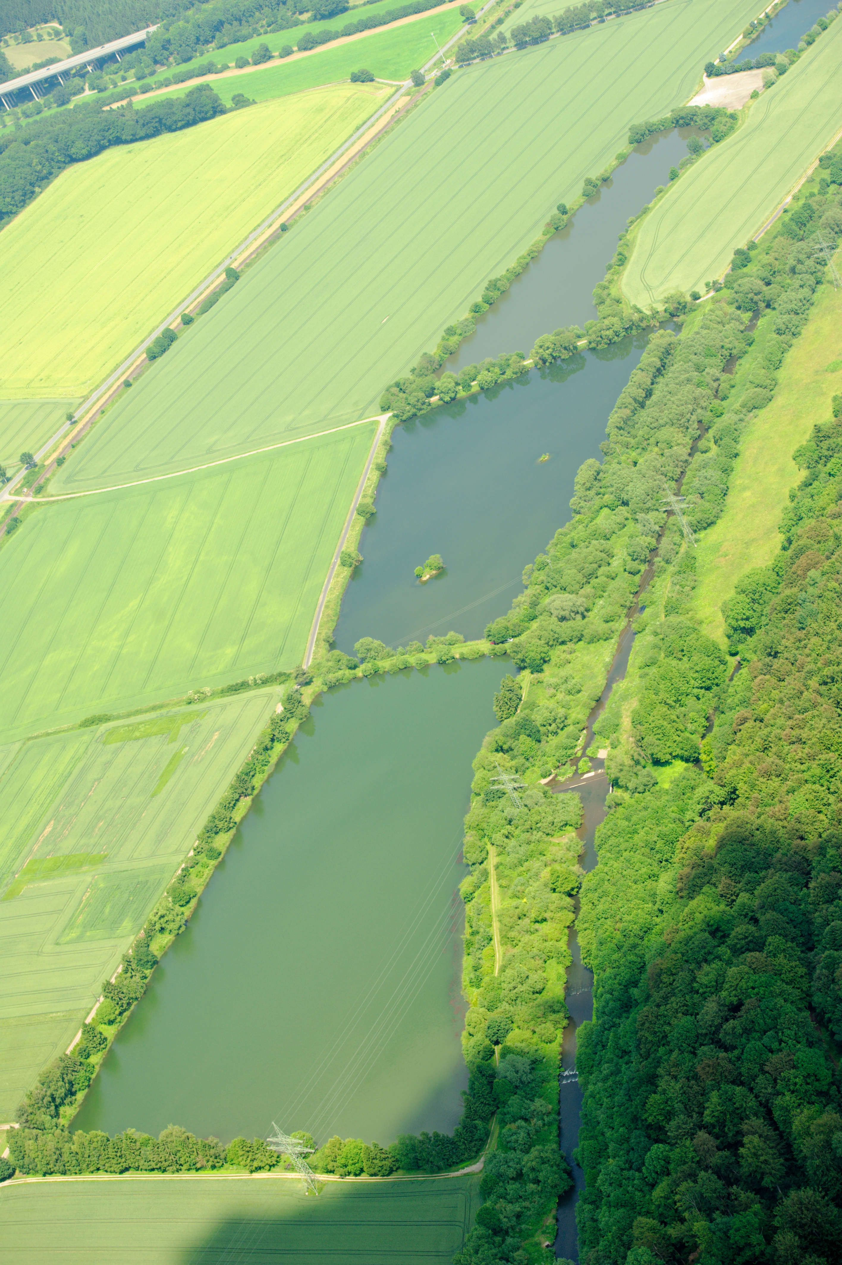 Fotoflug Sauerland-Ost: Westheimer Teiche, als Naturschutzgebiet Kiesgruben Dörpeder Mark (HSK-398) ausgewiesen; rechts Diemel, links Bundesstraße 7 und ganz links Bundesautobahn 44. The making of this document was supported by the Community-Budget of Wikimedia Germany.